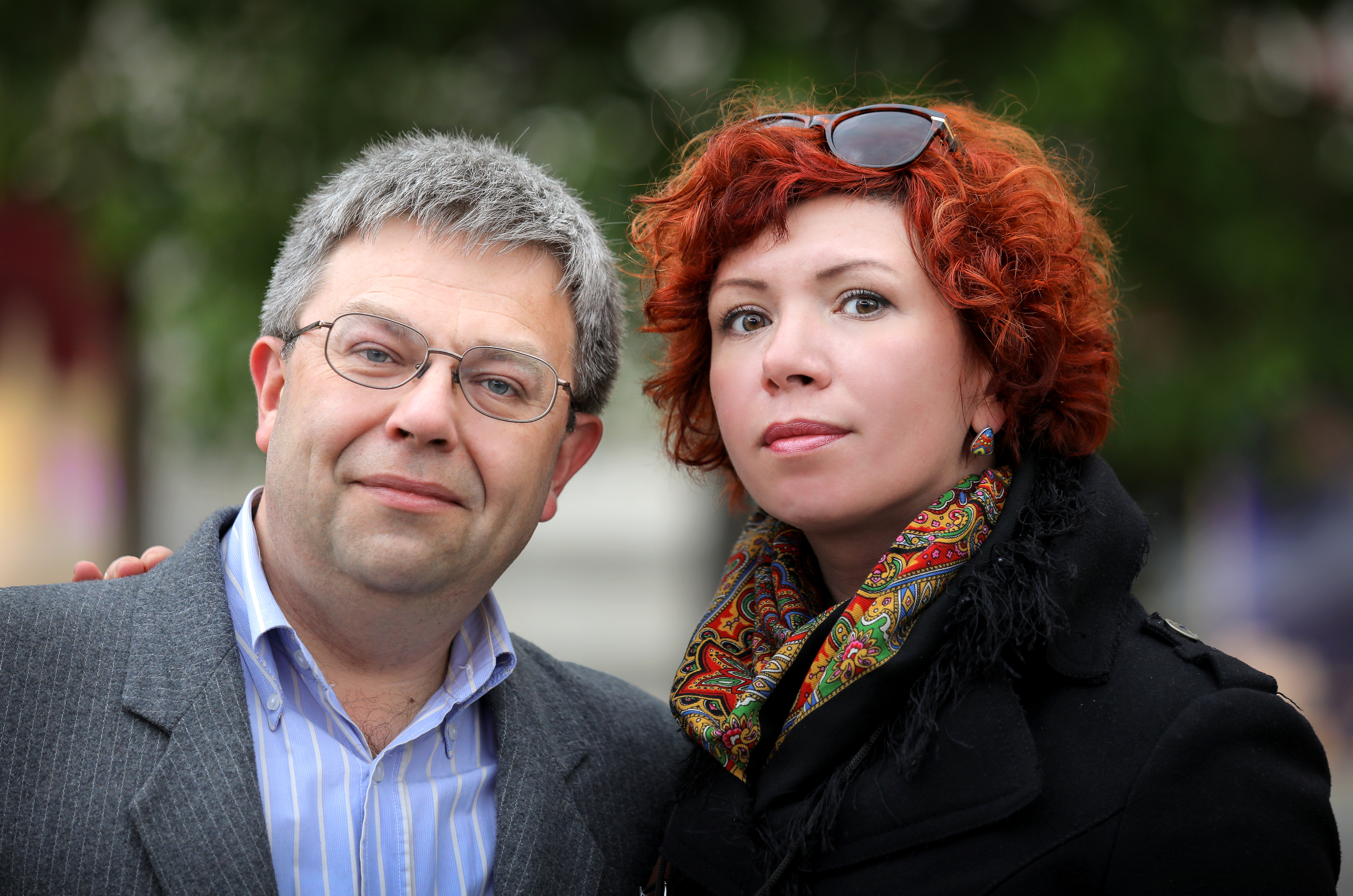 Максим Амелин (поэт) со своей женой Анной Золотарёвой (поэт, переводчик) на книжном фестивале "Красная площадь" в Москве.